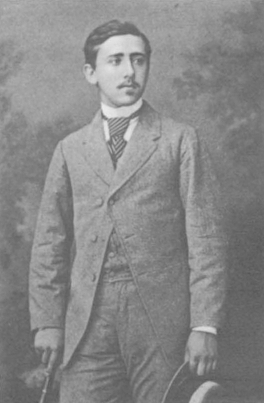 Александр Михайлович Безобразов, отставной офицер Кавалергардского полка, статс-секретарь в 1903—1905 гг.